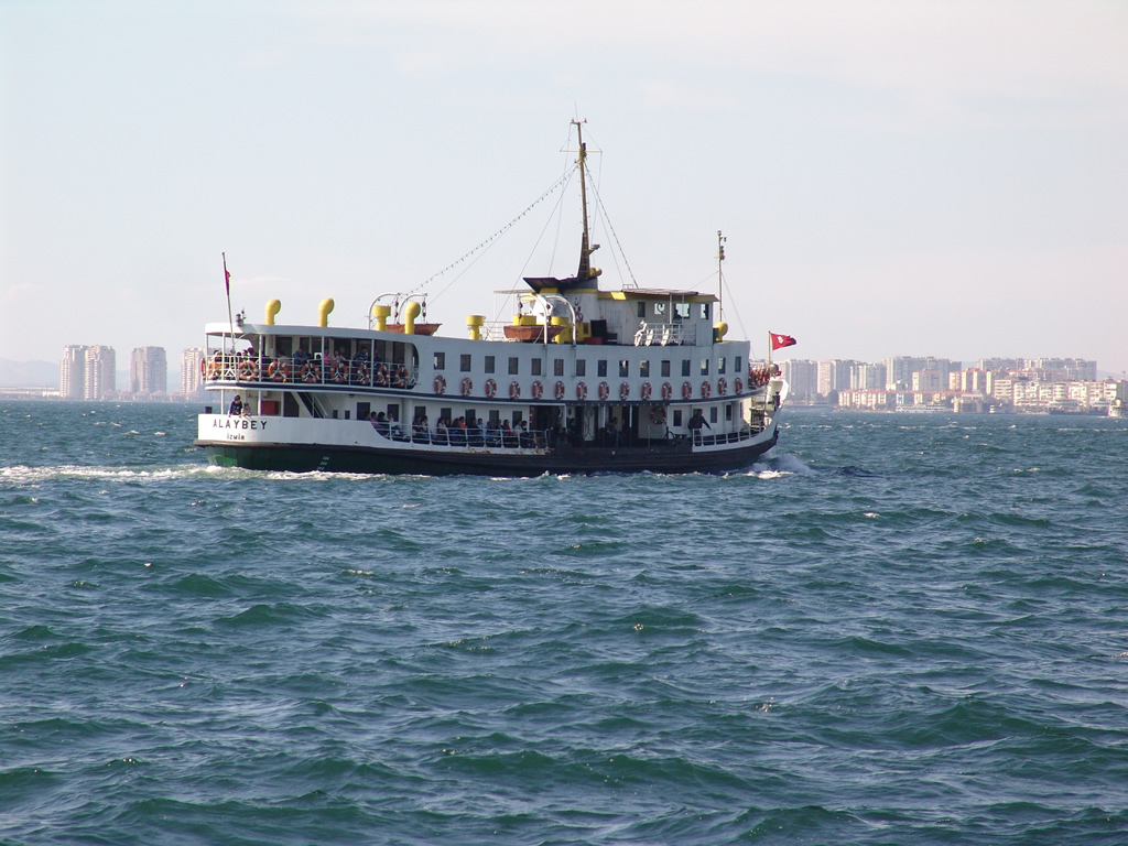 Ferry Alaybey transporting passengers between Konak and Karşıyaka, İzmir, Turkey IMO number: 7364211